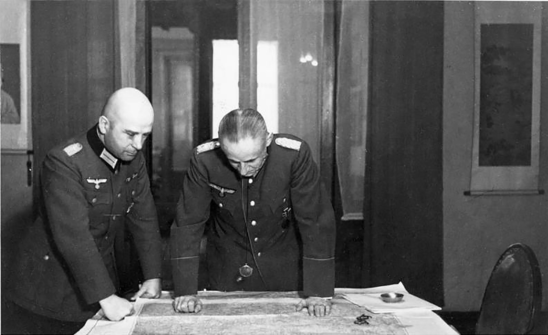 General [Ernst August] Köstring (rechts) und Oberstleutnant [Hans] Krebs vor der Karte